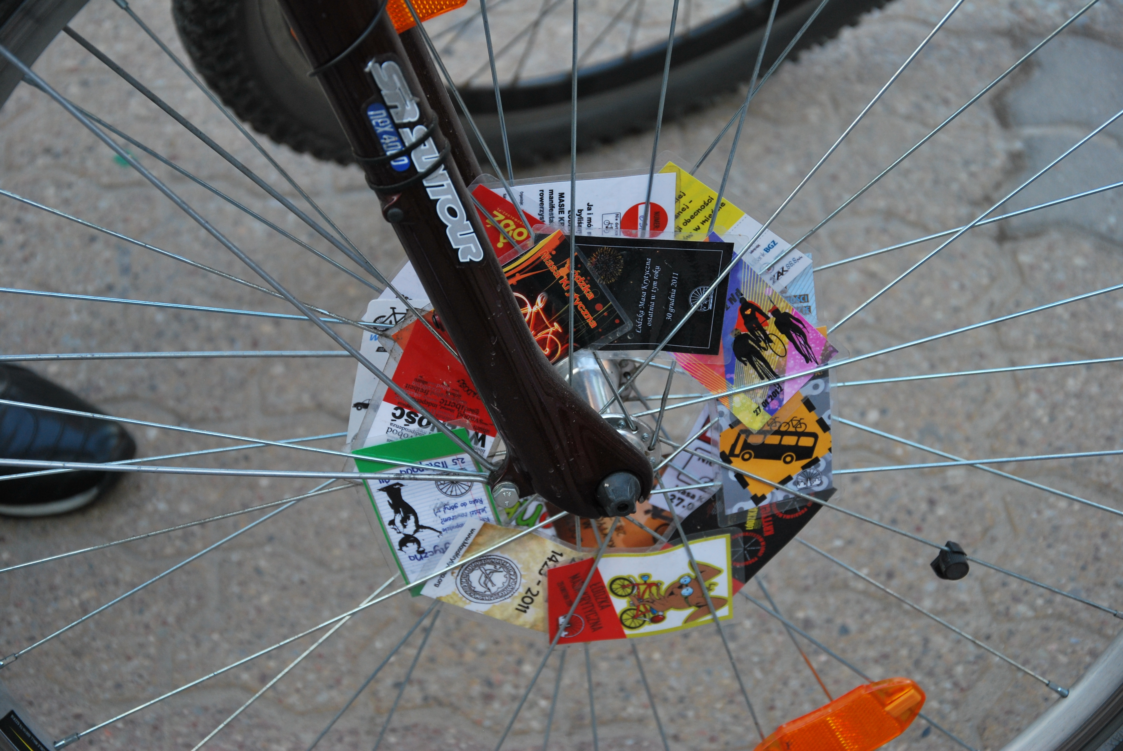 Masa Krytyczna Łódź kwiecień 2013, szprychówki